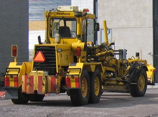 Vammas-tiekarhu